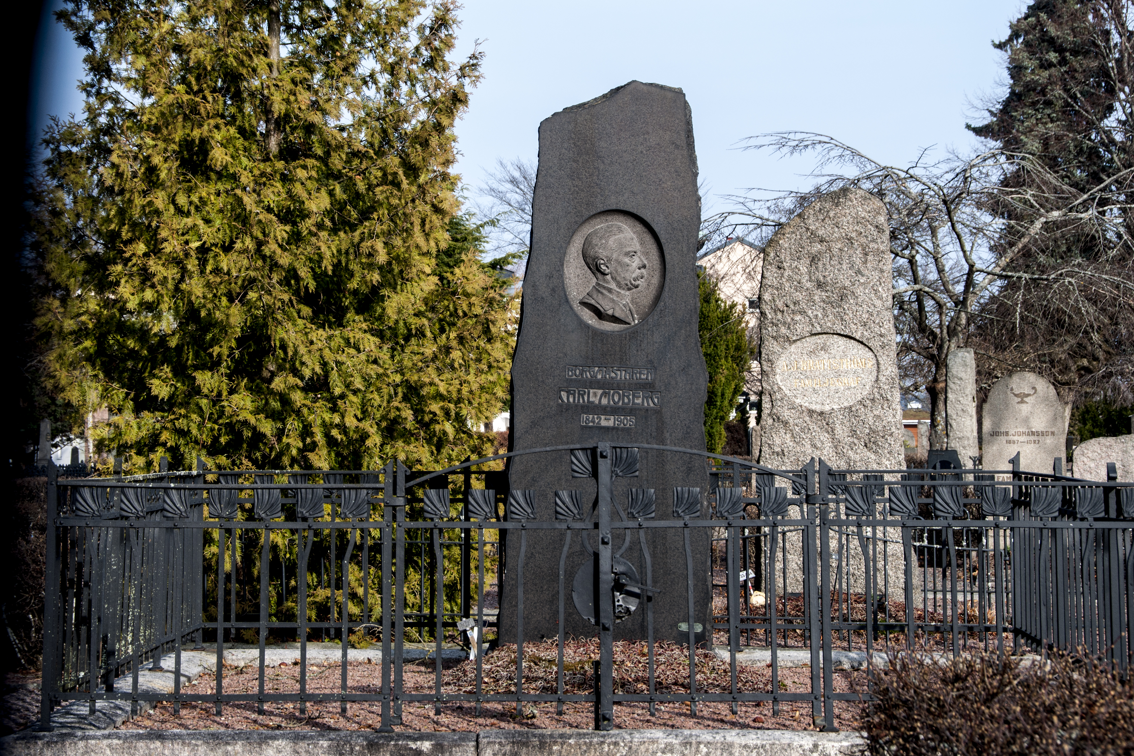 Carl Mobergs gravvård i Karlstad